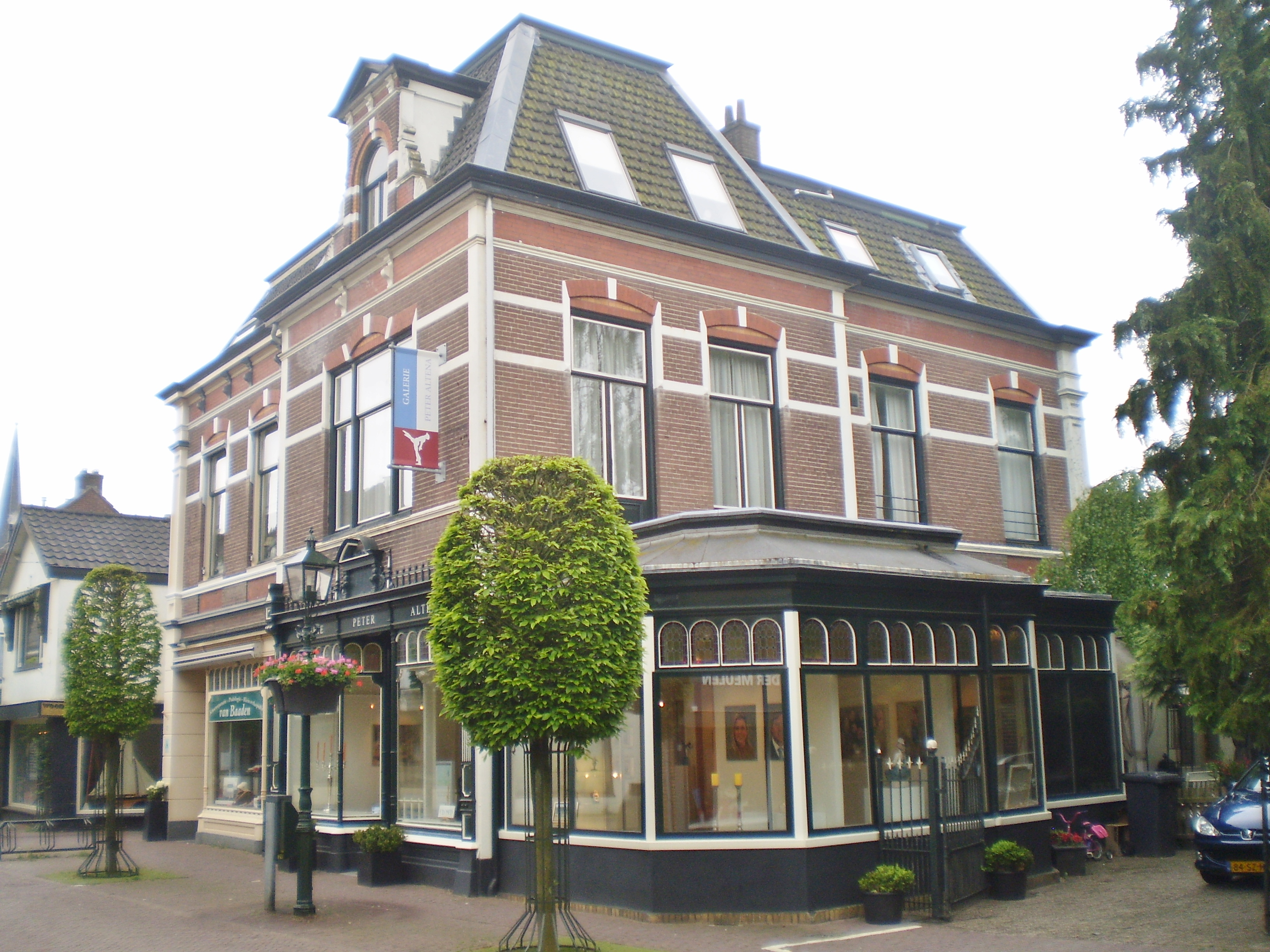 Hier begon de Fa de Ruyter haar productie